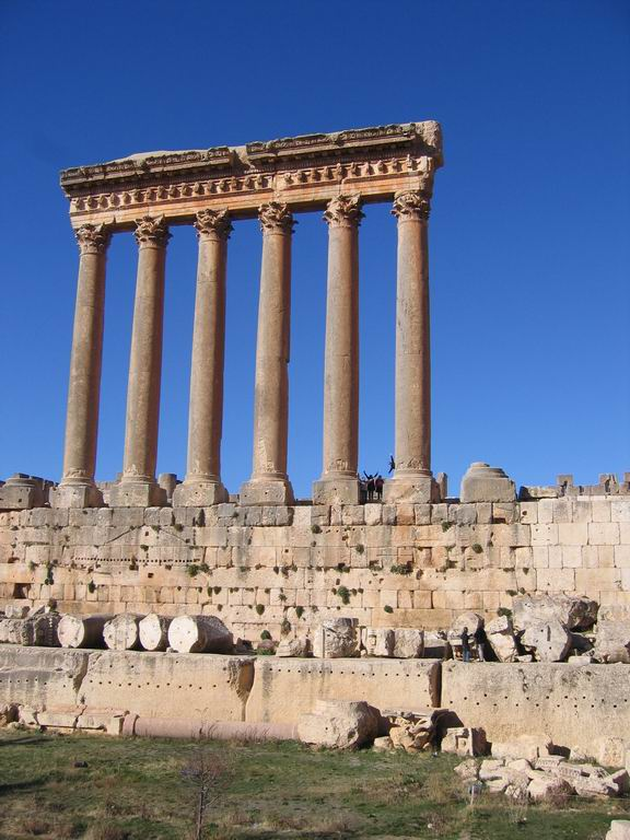 Die sechs Säulen des Jupitertempels. In der untersten Reihe des Fundaments befinden sich die zweit-, dritt- und viertgrößten jemals verbauten Steine der Welt.